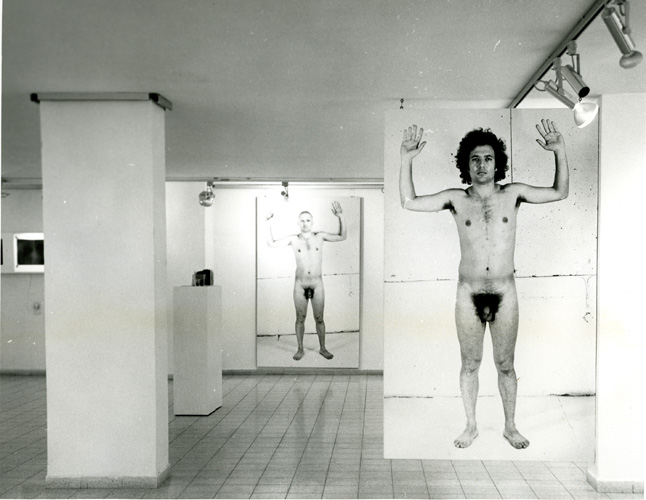 installation